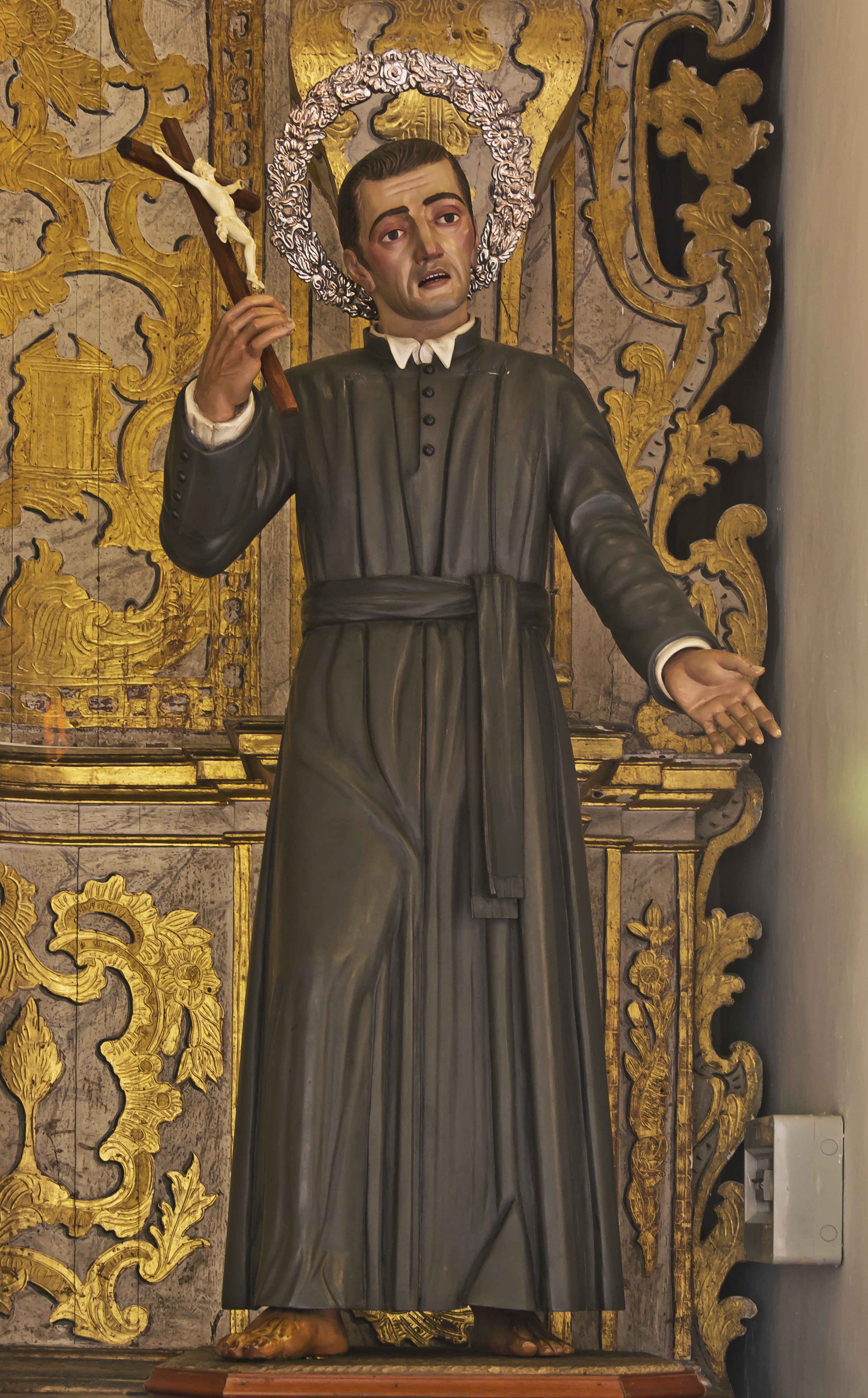 Figur des Padre Anchieta in der Kathedrale in La Laguna